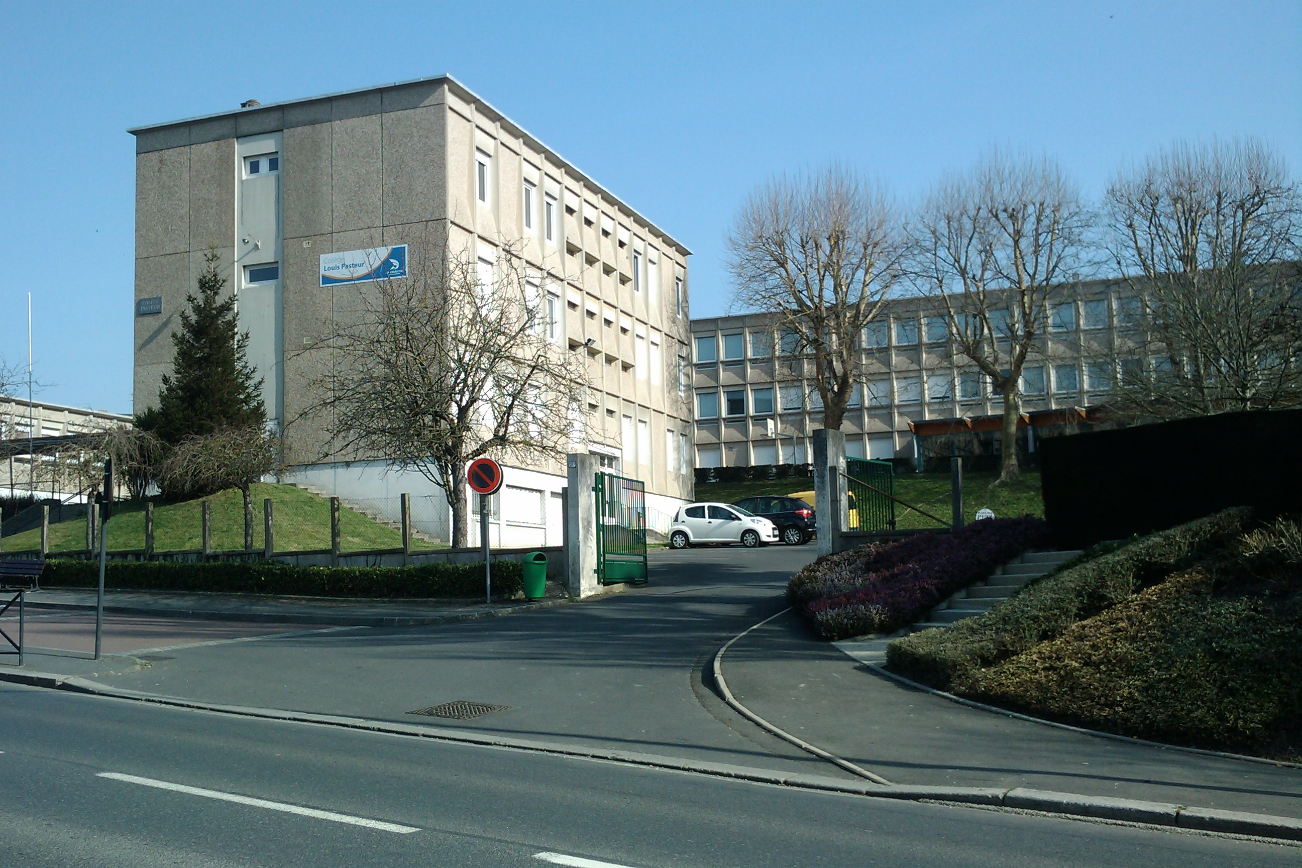 Collège Louis Pasteur de Saint-Lô